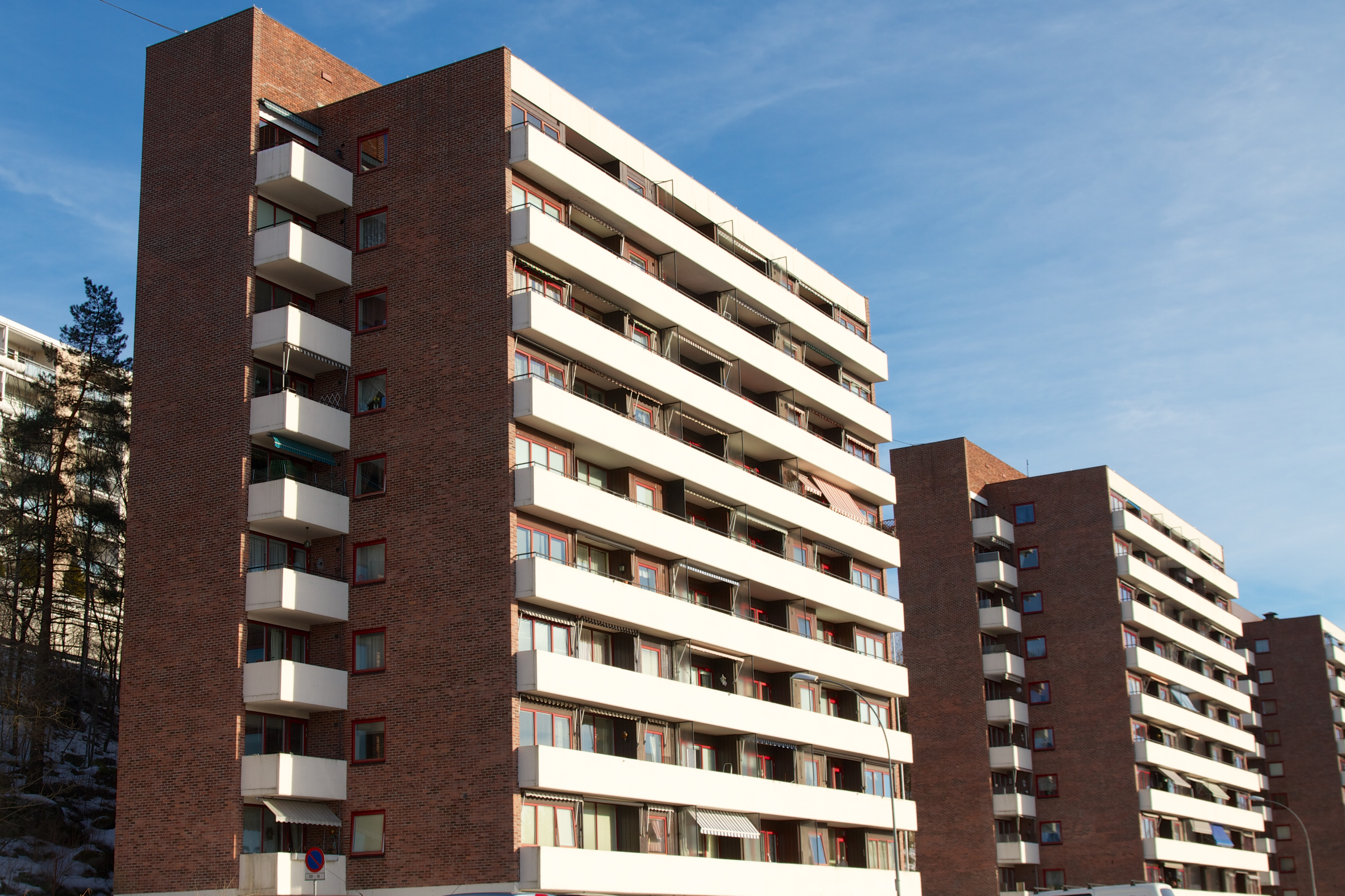 Høyblokker på Bogerud i Oslo.